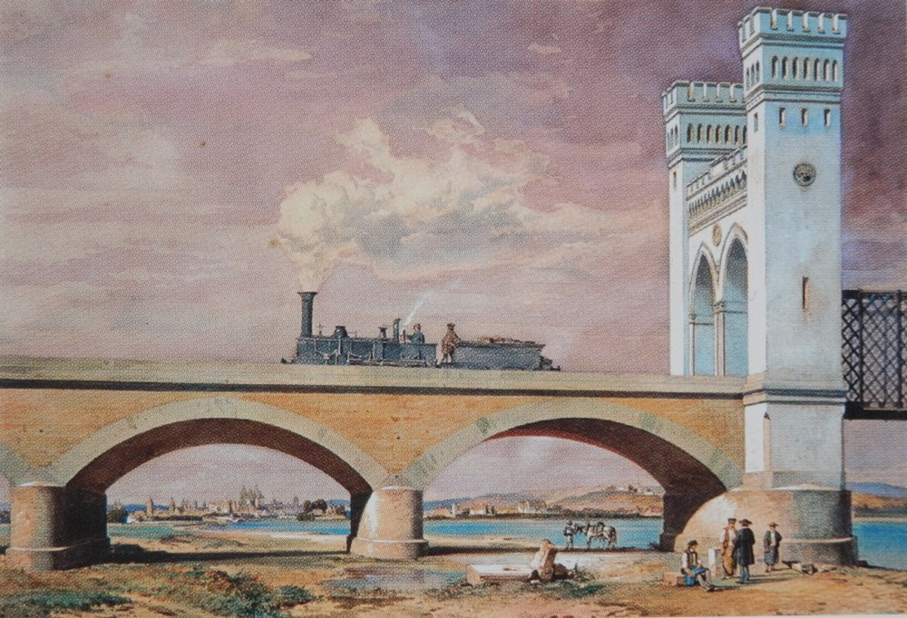 Donaubrücke Schwabelweis bei Regensburg aus der Aquarell-Serie "Ansichten von Ortschaften an den bayerischen Ostbahnen" von Albert Emil Kirchner 1859